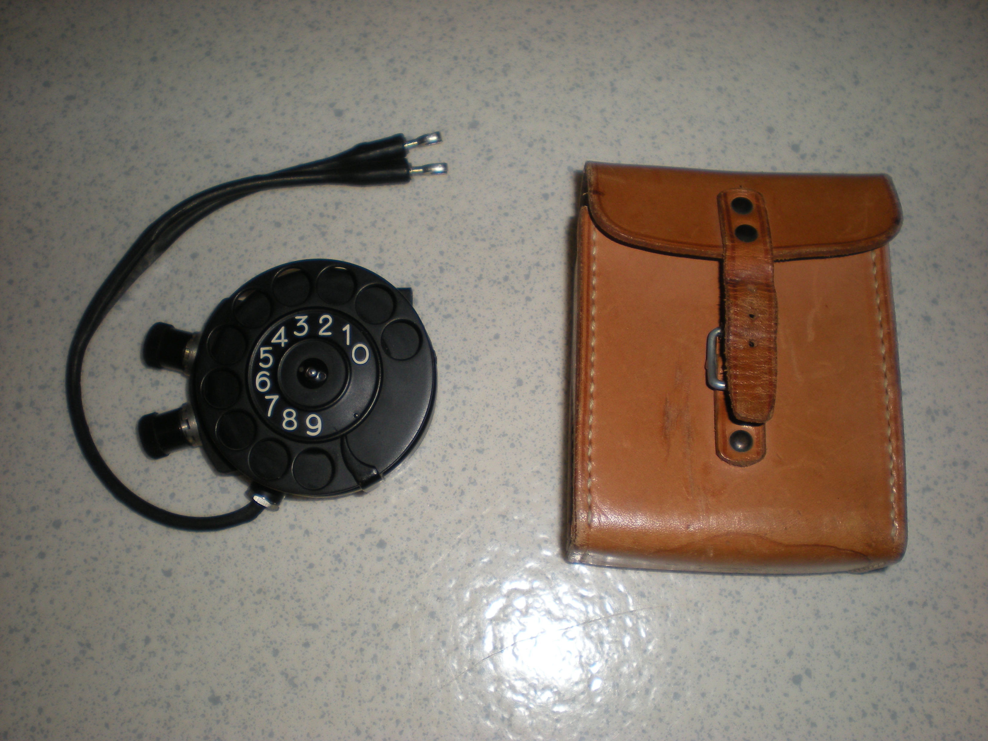 Äldre modellen av fingerskiva till Fälttelefonapparat m/37